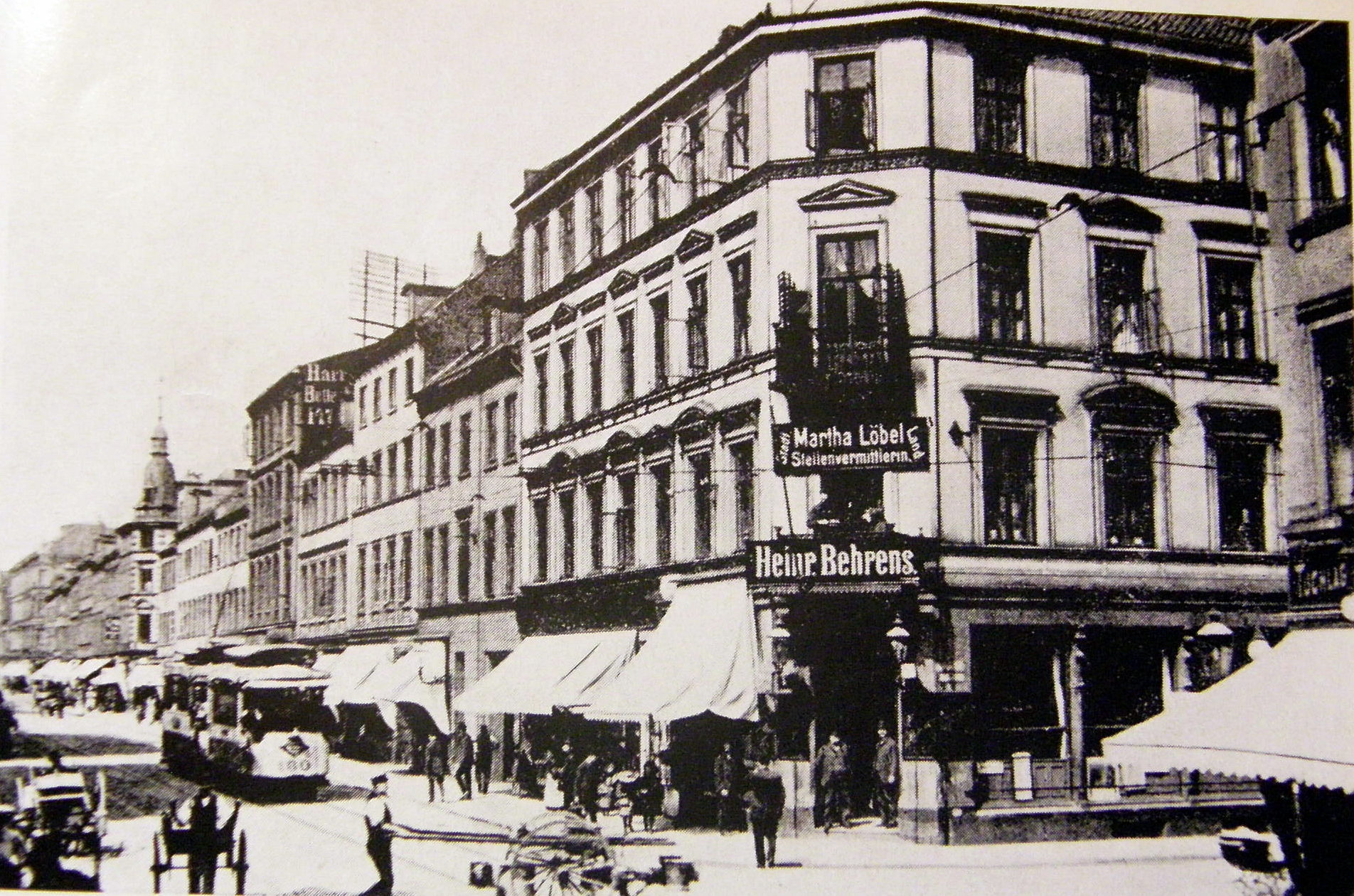 Altona-Altstadt, Große Bergstraße Ecke Bürgerstraße, heute Thedestraße